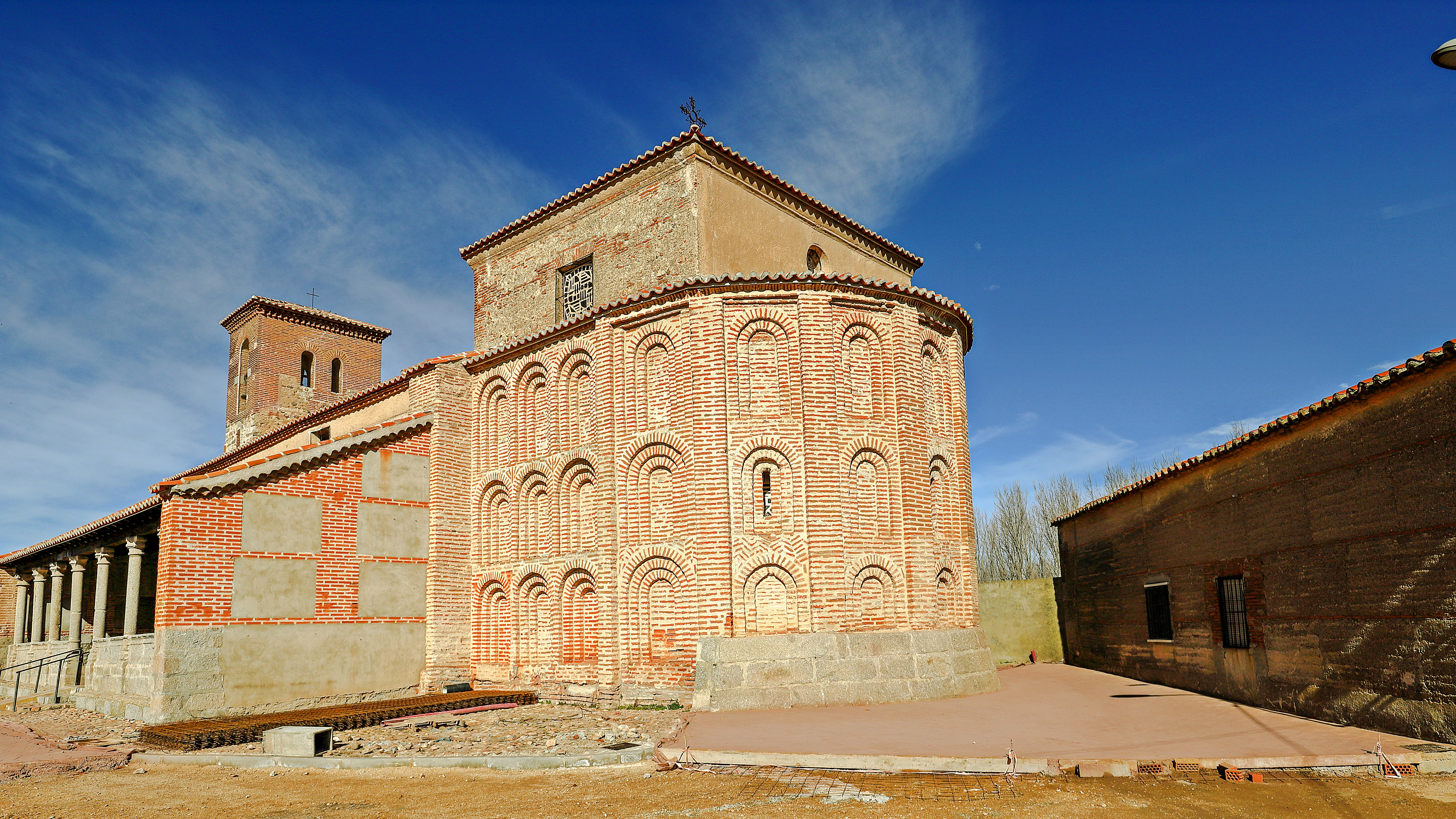 Gajates es un municipio de la comarca Tierra de Alba, en la provincia de Salamanca.